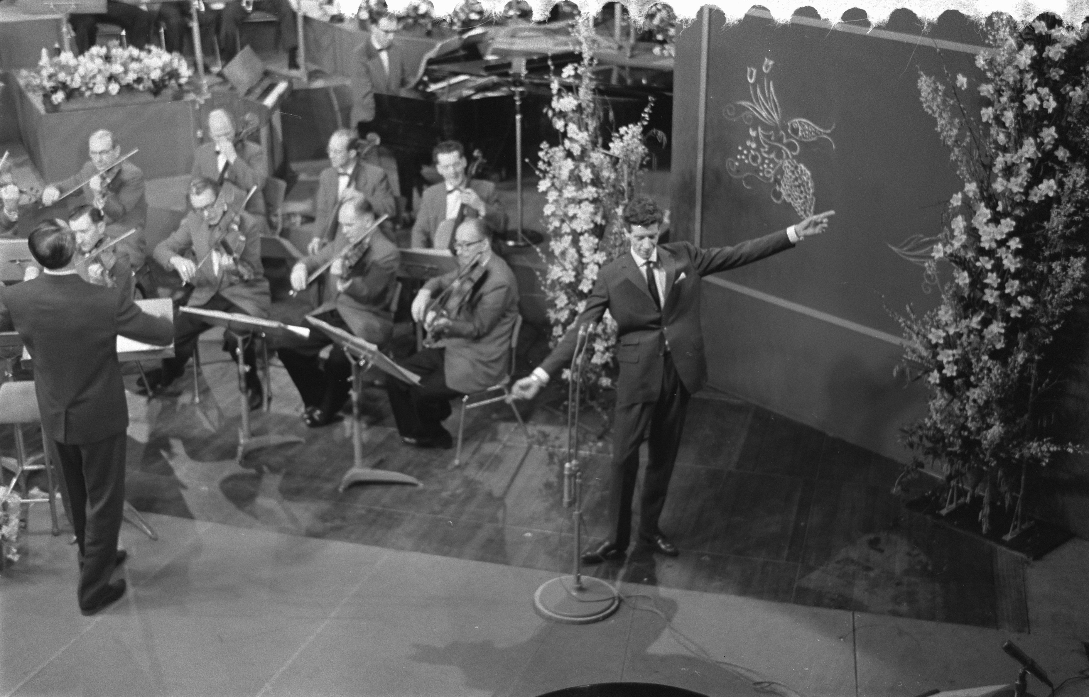 Collectie / Archief : Fotocollectie Anefo Reportage / Serie : [ onbekend ] Beschrijving : Finale van het Nationaal Songfestival 1960 in Hilversum, Rudy Carrell en orkest Datum : 9 februari 1960 Locatie : Hilversum Trefwoorden : artiesten, muziek, songfestivals Persoonsnaam : Carrell Rudy Fotograaf : Pot, Harry / Anefo Auteursrechthebbende : Nationaal Archief Materiaalsoort : Negatief (zwart/wit) Nummer archiefinventaris : bekijk toegang 2.24.01.05 Bestanddeelnummer : 911-0170